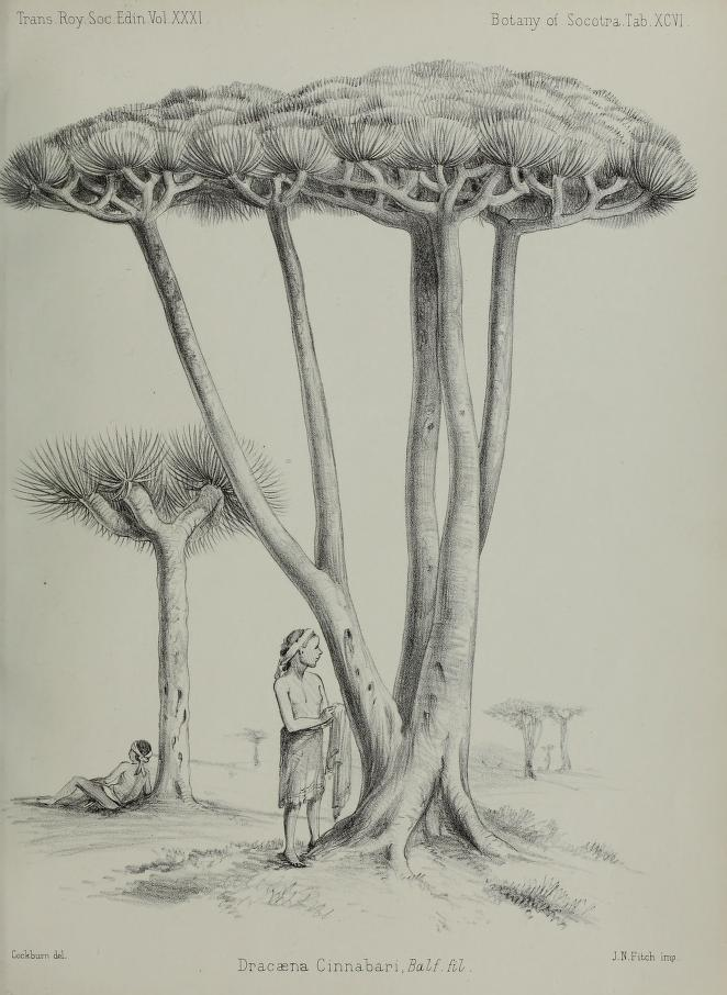 Tab. XCVI - Dracaena cinnabari, Balf.fil.